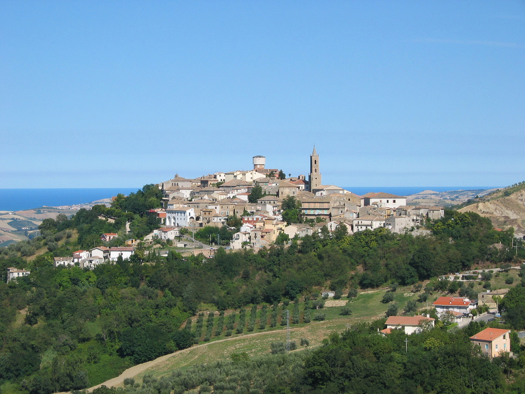 vista panoramica